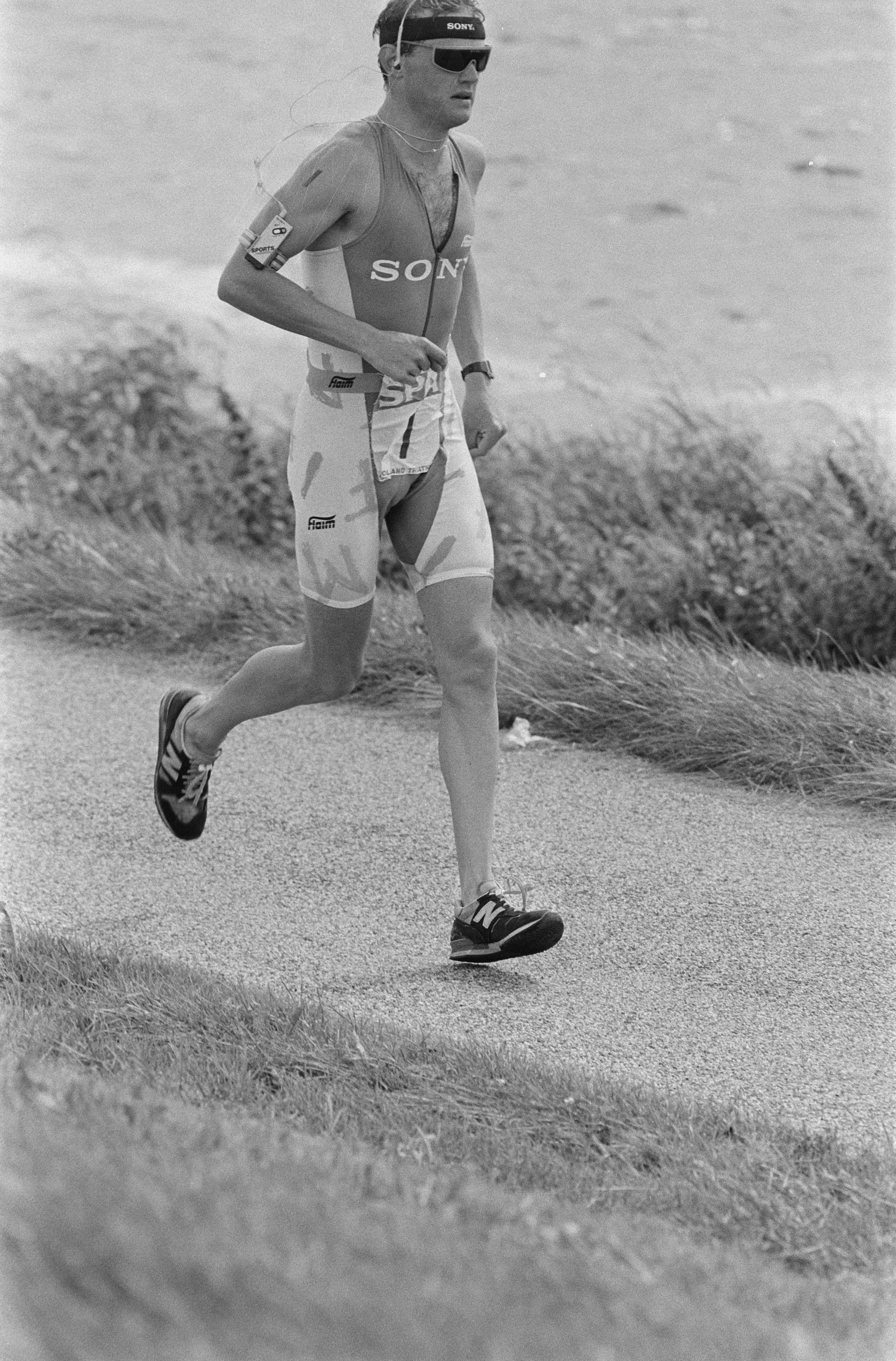 Collectie / Archief : Fotocollectie Anefo Reportage / Serie : [ onbekend ] Beschrijving : Triathlon in Almere; Axel Koenders tijdens de triathlon lopen Datum : 15 augustus 1987 Locatie : Almere, Flevoland Trefwoorden : triathlons Persoonsnaam : Axel Koenders Fotograaf : Molendijk, Bart / Anefo Auteursrechthebbende : Nationaal Archief Materiaalsoort : Negatief (zwart/wit) Nummer archiefinventaris : bekijk toegang 2.24.01.05 Bestanddeelnummer : 934-0510